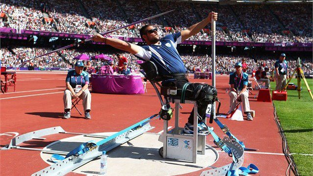 Παραολυμπιακοί Λονδίνο 2012